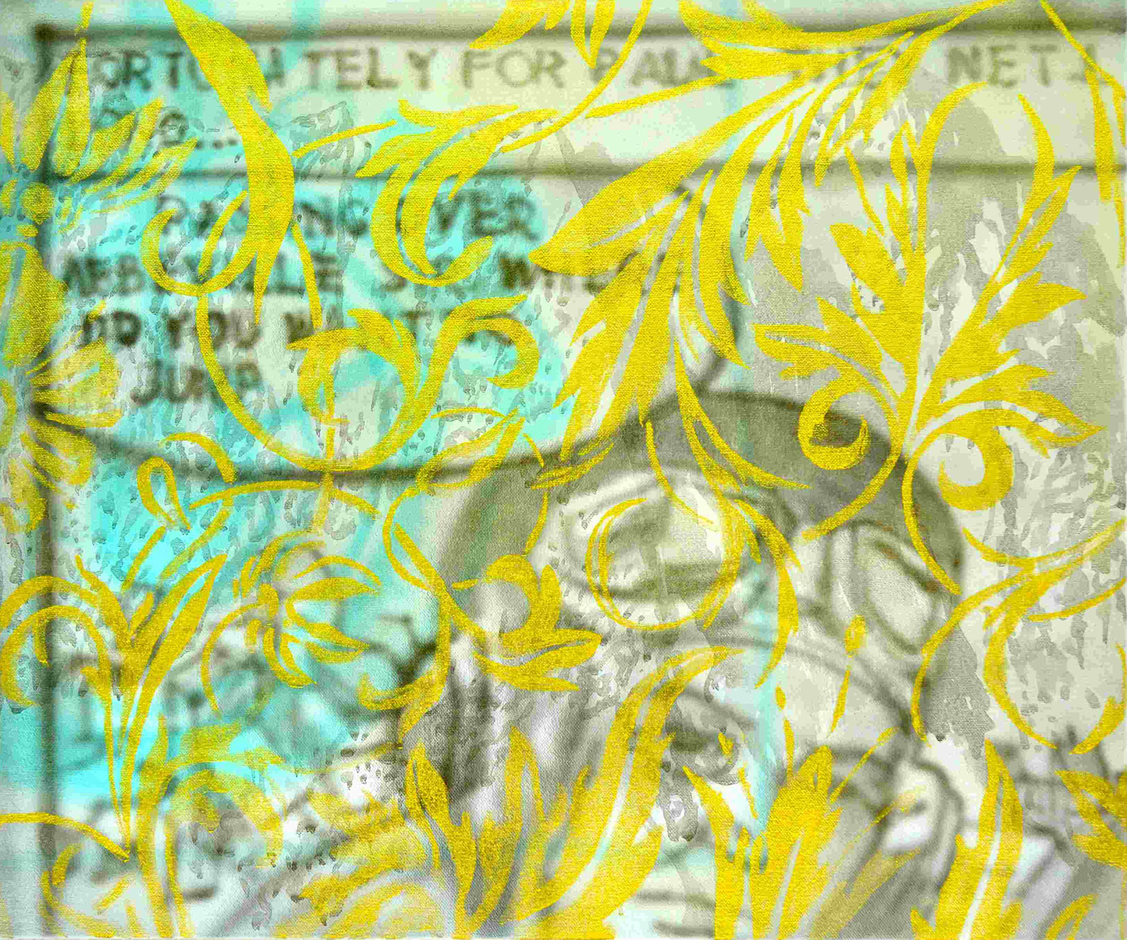 Keining - Fortuna, 75cm x 90 cm, Kunstharz auf Leinwand, 2012, Copyright Wolfgang Rieger und Horst Keining, 2013.